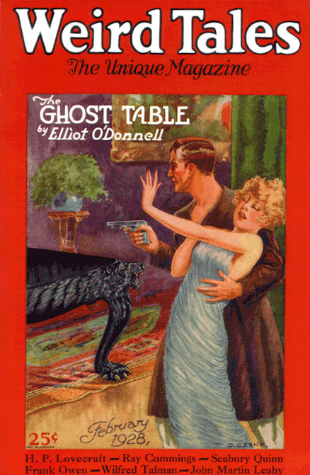 Ketañ embann a c'hGalv Cthulhu